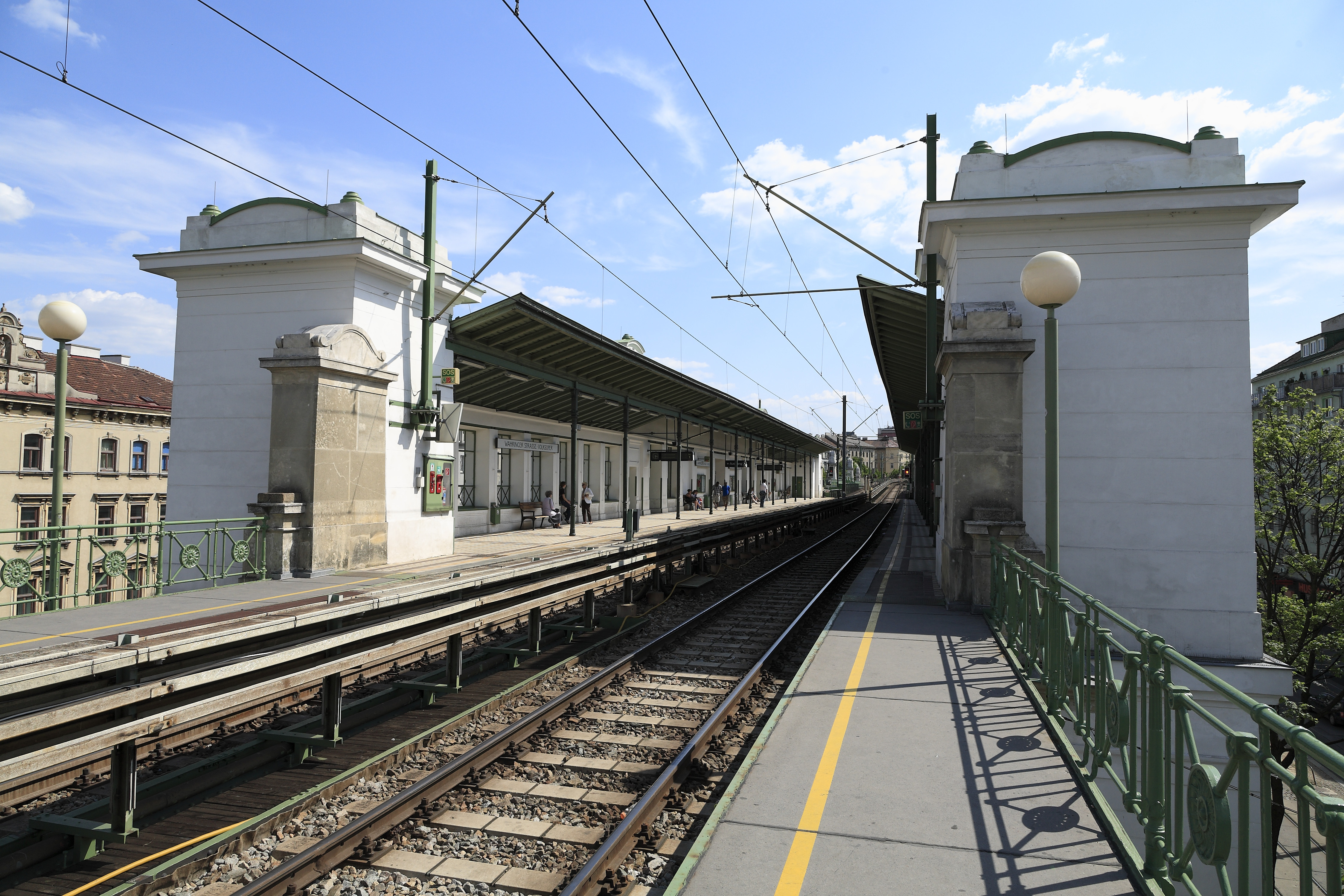 Richtung Süden, die schmalen Bahnsteigenden auf der Brücke über die Gentzgasse wirken wie nachträglich angebaut. Der Bodenbelag weicht ab, außerdem liegt der Bereich außerhalb des Stationsbauwerkes.